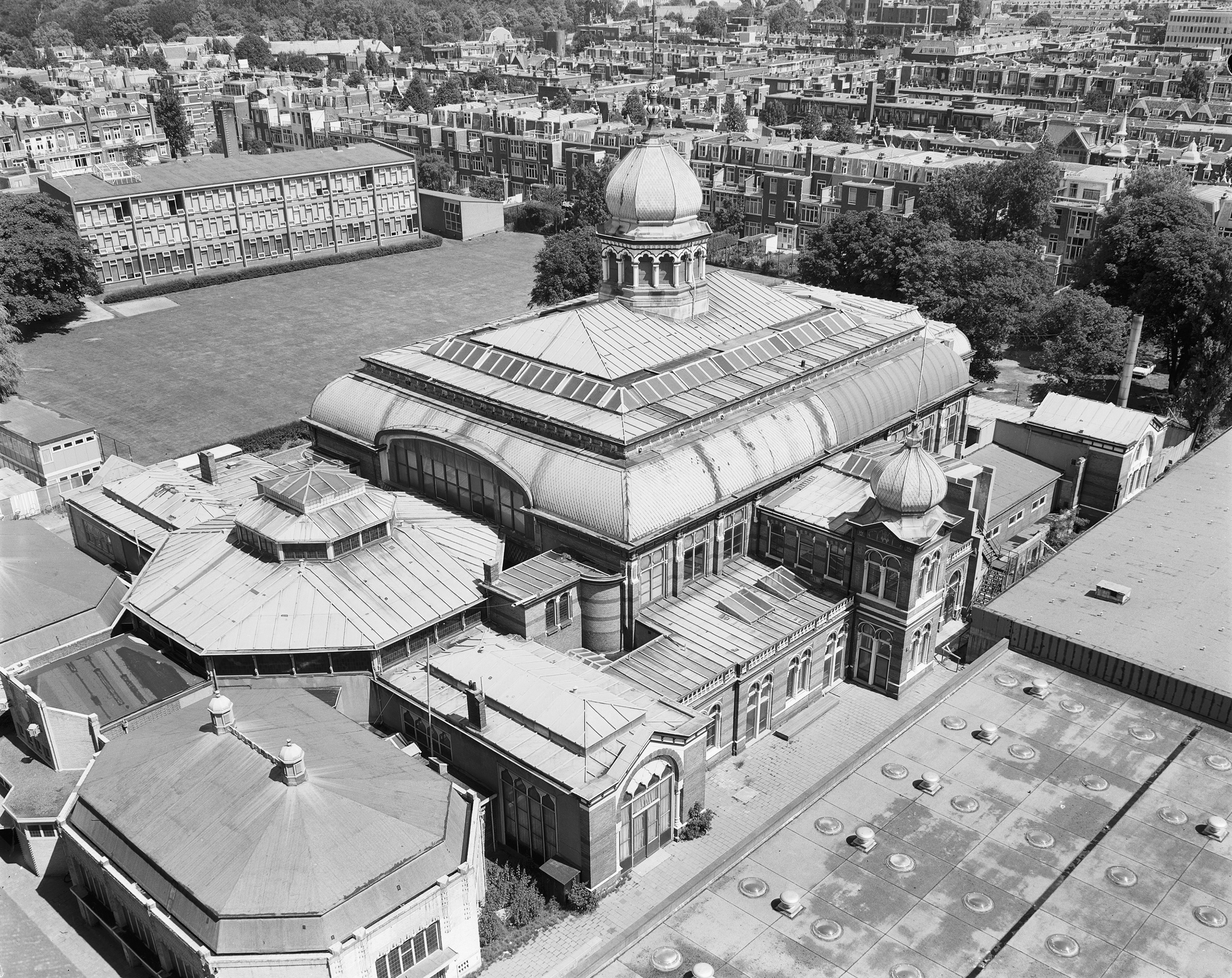 Diversen: Dierentuinzaal, exterieur overzicht